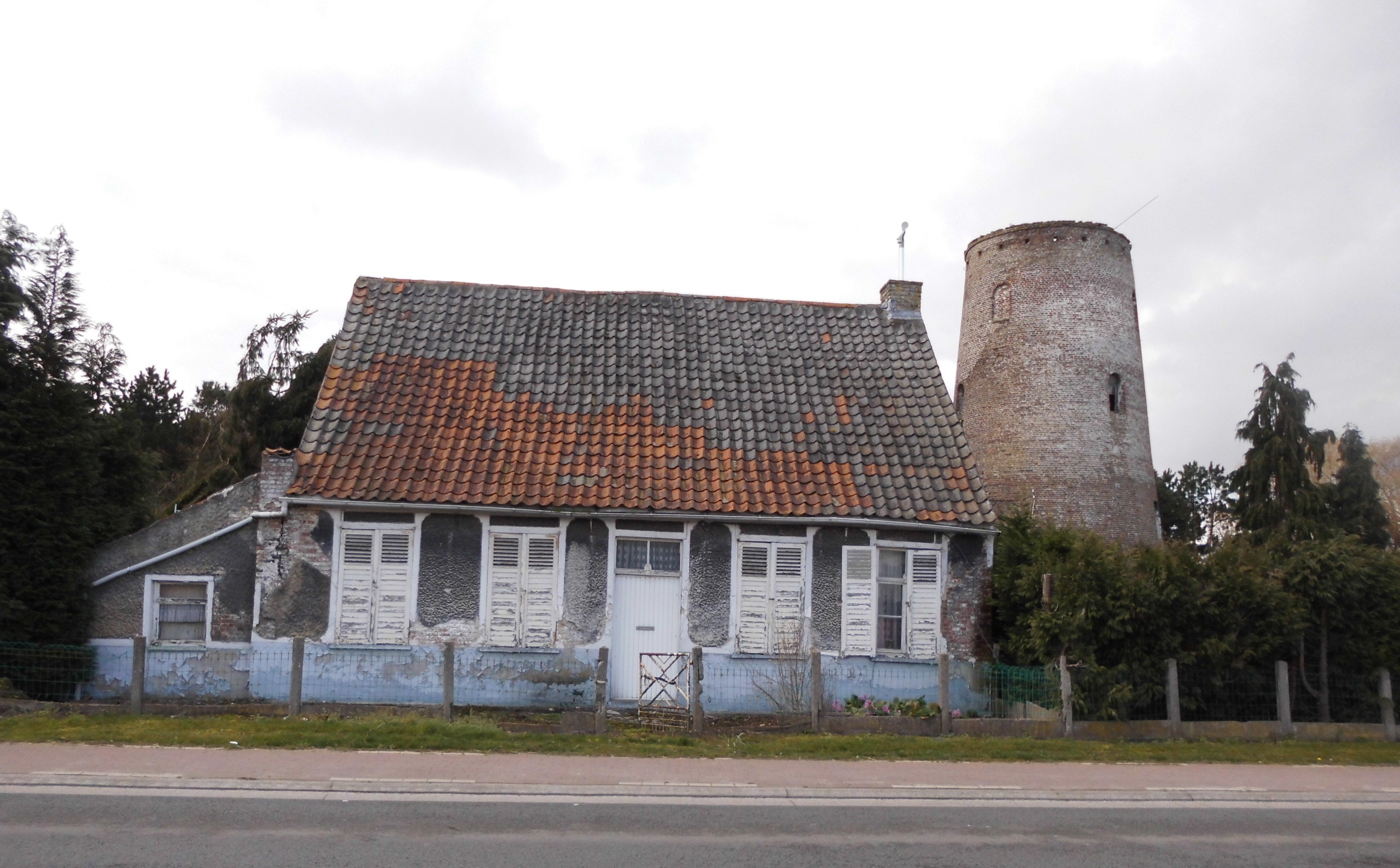 Molenromp met woning - Molenstraat - Kaprijke - Oost-Vlaanderen - België